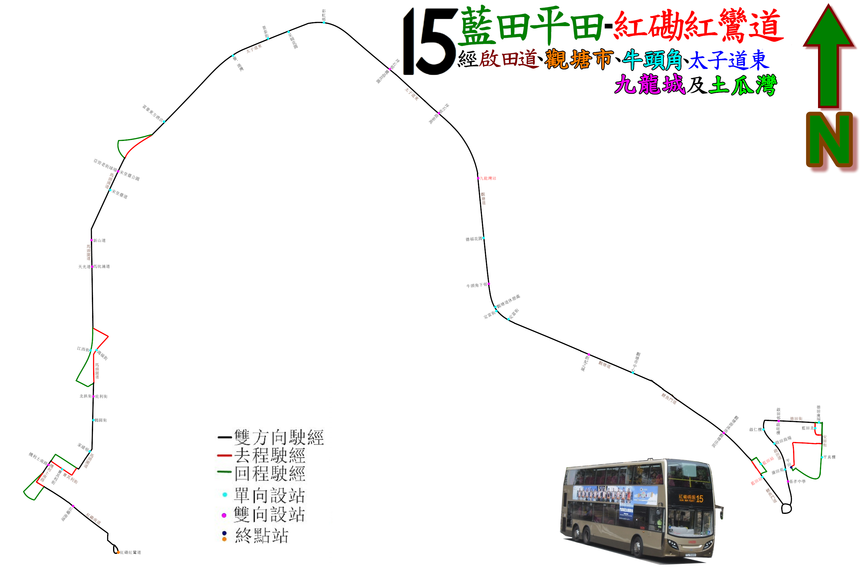 中文（香港）: 九巴15號線的走線圖